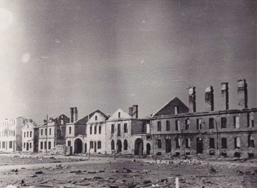 Sõjajärgse Narva Peetriplatsi põhjaosa